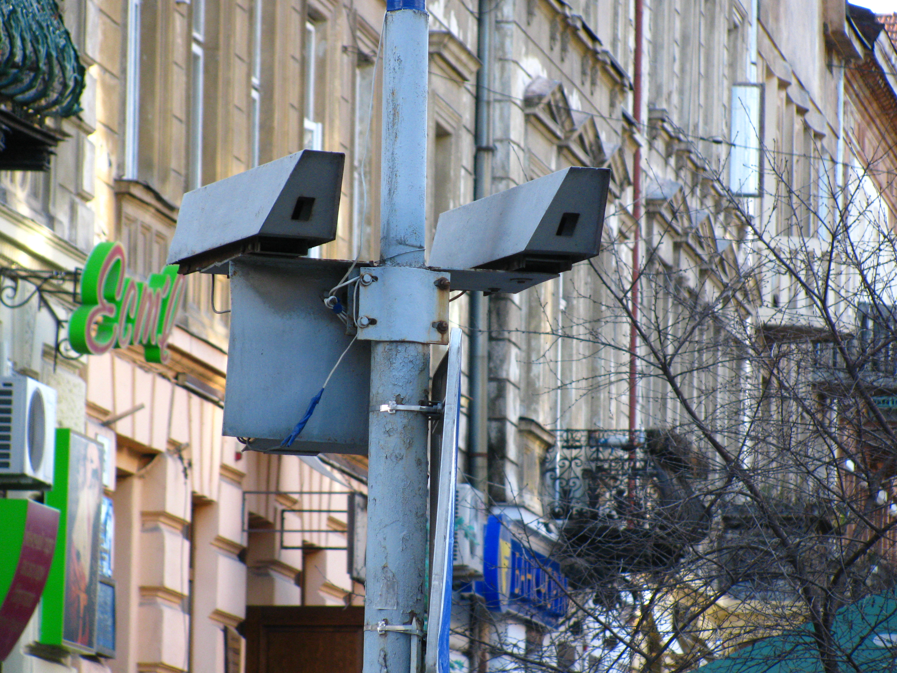 "сканер" - елемент не введеної в дію автоматичної системи контролю за рухом львівських трамваїв